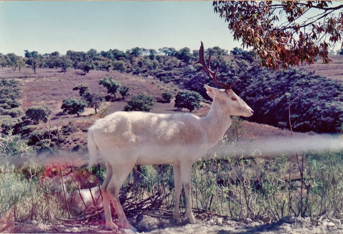 Venado Gamo en variedad blanca. Foto tomada en el zoológico de Africam Safari, la linea blanca del centro es el vidrio del automóvil desde donde se tomo la foto